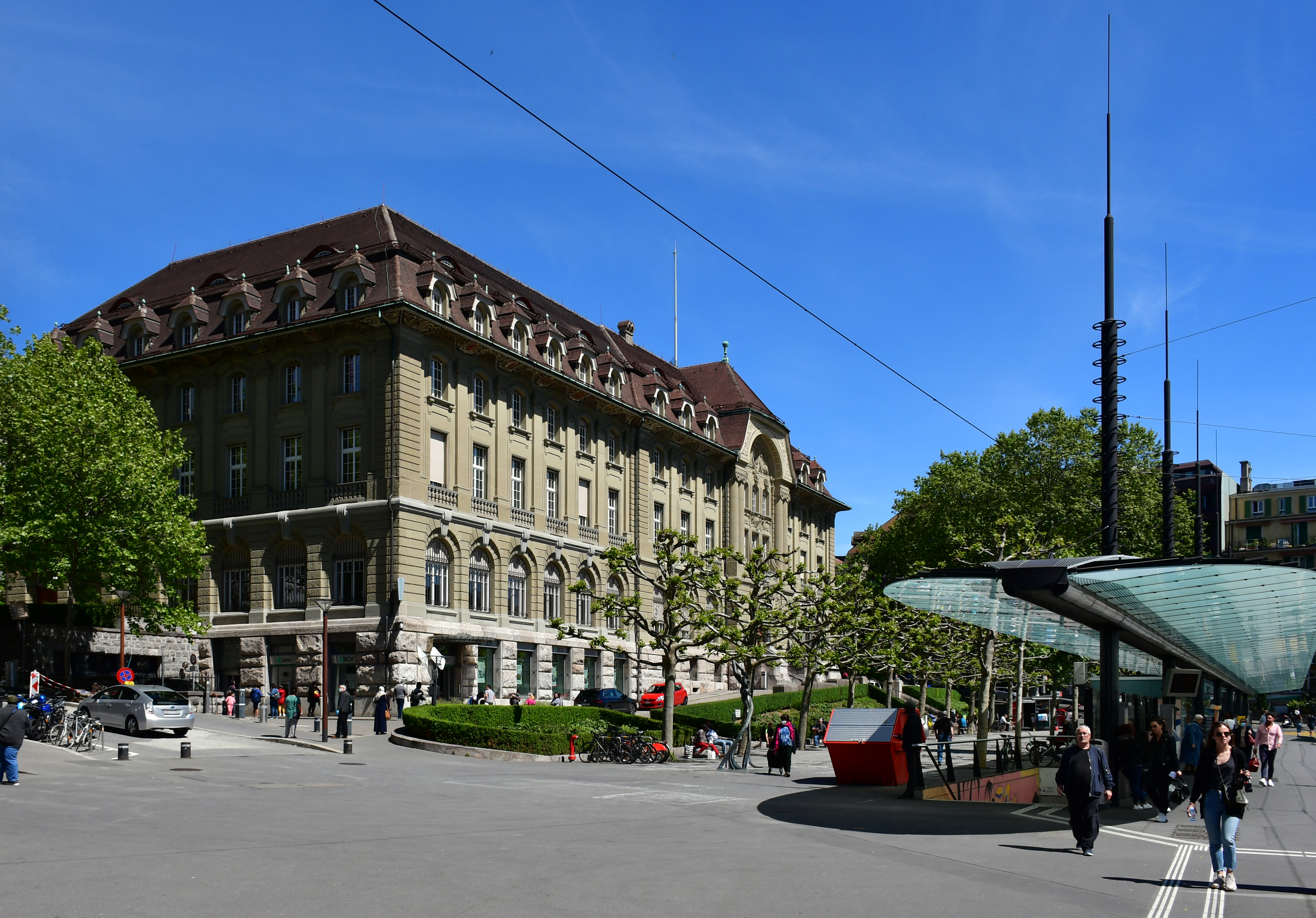 Ancien siège du Crédit foncier vaudois, construit sur la place Chauderon de Lausanne (Suisse) en 1911. L'aile ouest date de 1936. Le bâtiment est occupé par la Banque cantonale vaudoise (BCV) depuis son rachat du Crédit foncier vaudois.